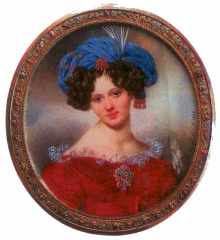 Графиня Варвара Петровна Шувалова, ур. Шаховская (1796-1870), с 1816 года замужем первым браком за графом П.А.Шуваловым; с 1826 года за графом А.А.Полье, в третьем браке за князем Г.В.Бутера.